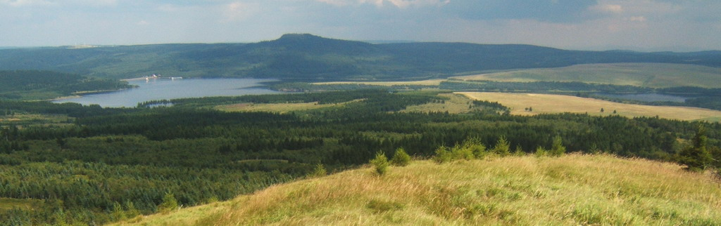 Preßnitztalsperre near Vejprty, Ore Mountains, CZ viewn from Velky Spicak (Großer Spitzberg)